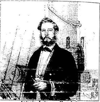 Antonio Luiz von Hoonholtz, 1º Tenente da armada e comandanta da Canhoneira Araguary.